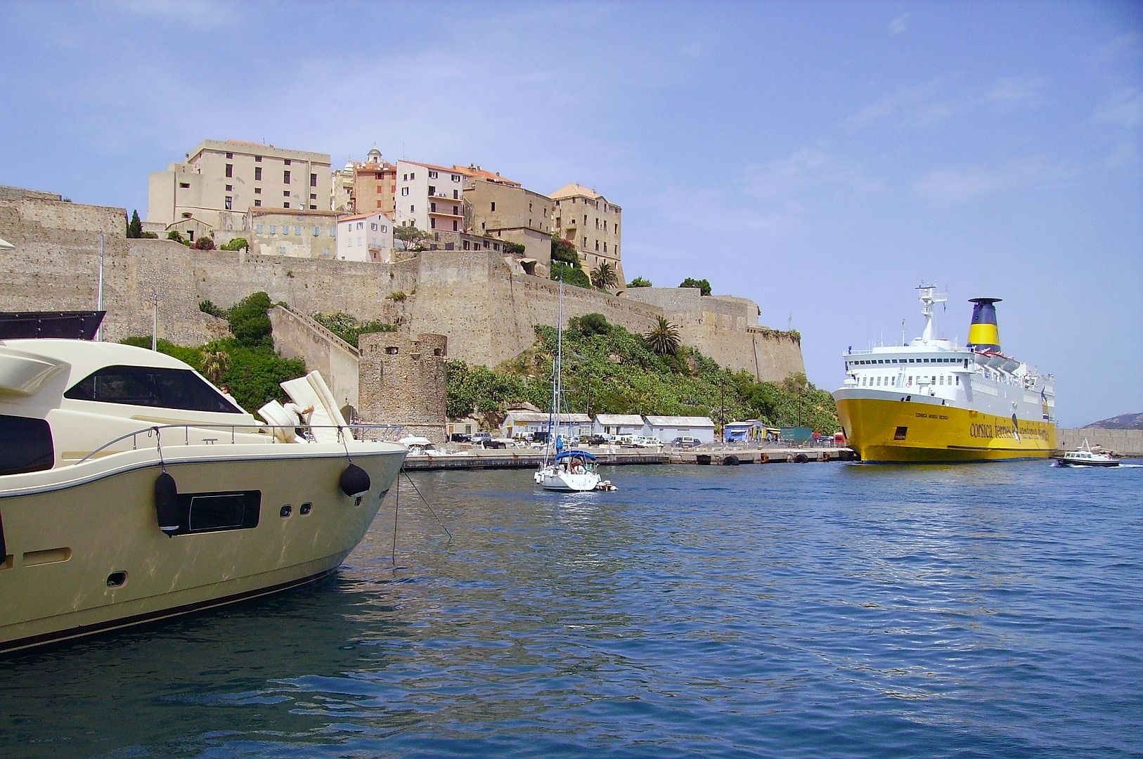 Le ferry "Corsica Serena Seconda" au port de Calvi le 22 juillet 2009.